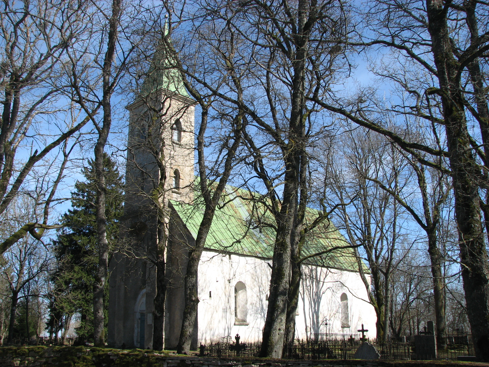 Kirbla Püha Nikolause kirik aprillis 2011